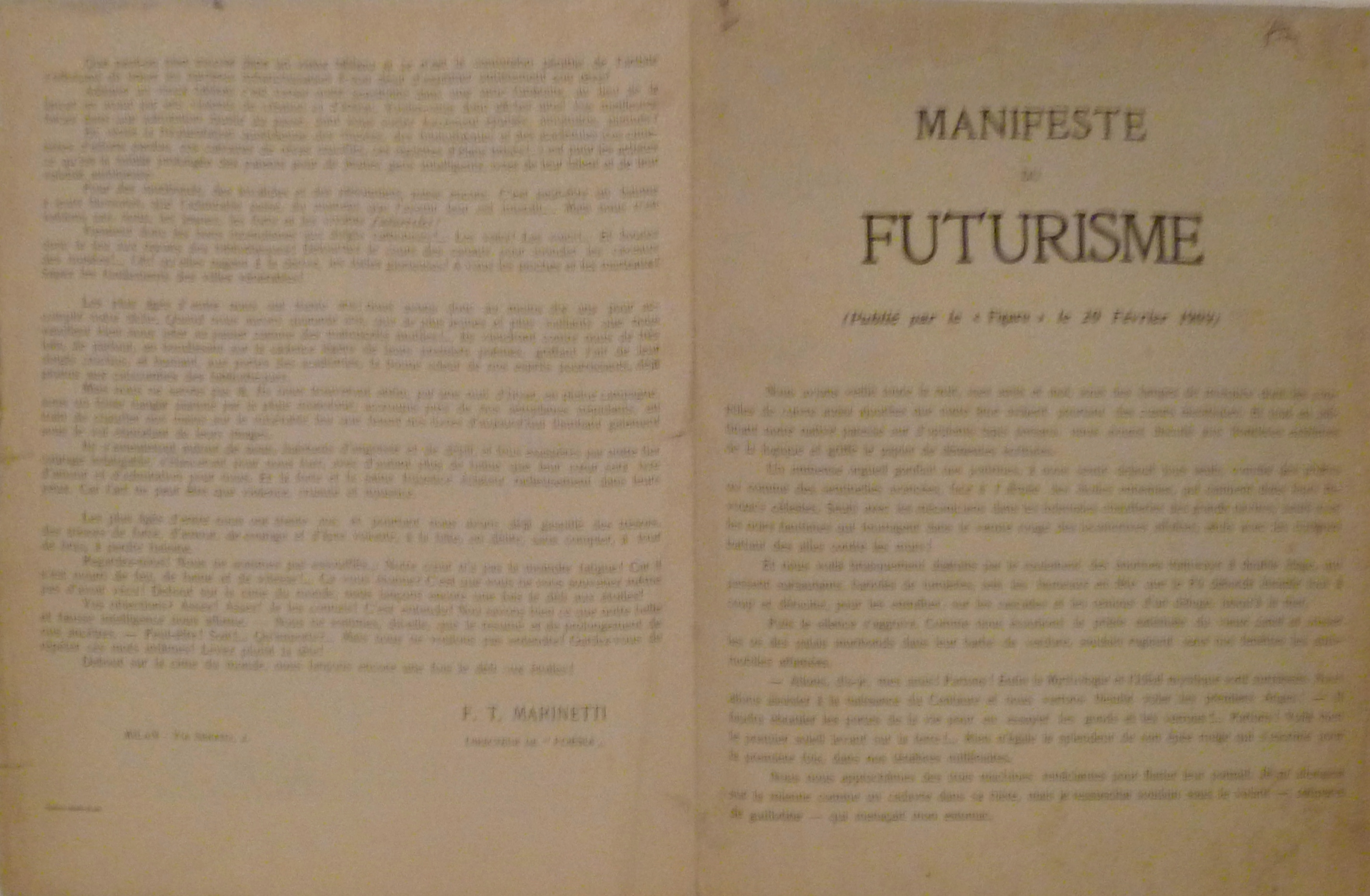 Manifesto of Futurism (in French), as it appeared in "Le Figaro", 20 February 1909